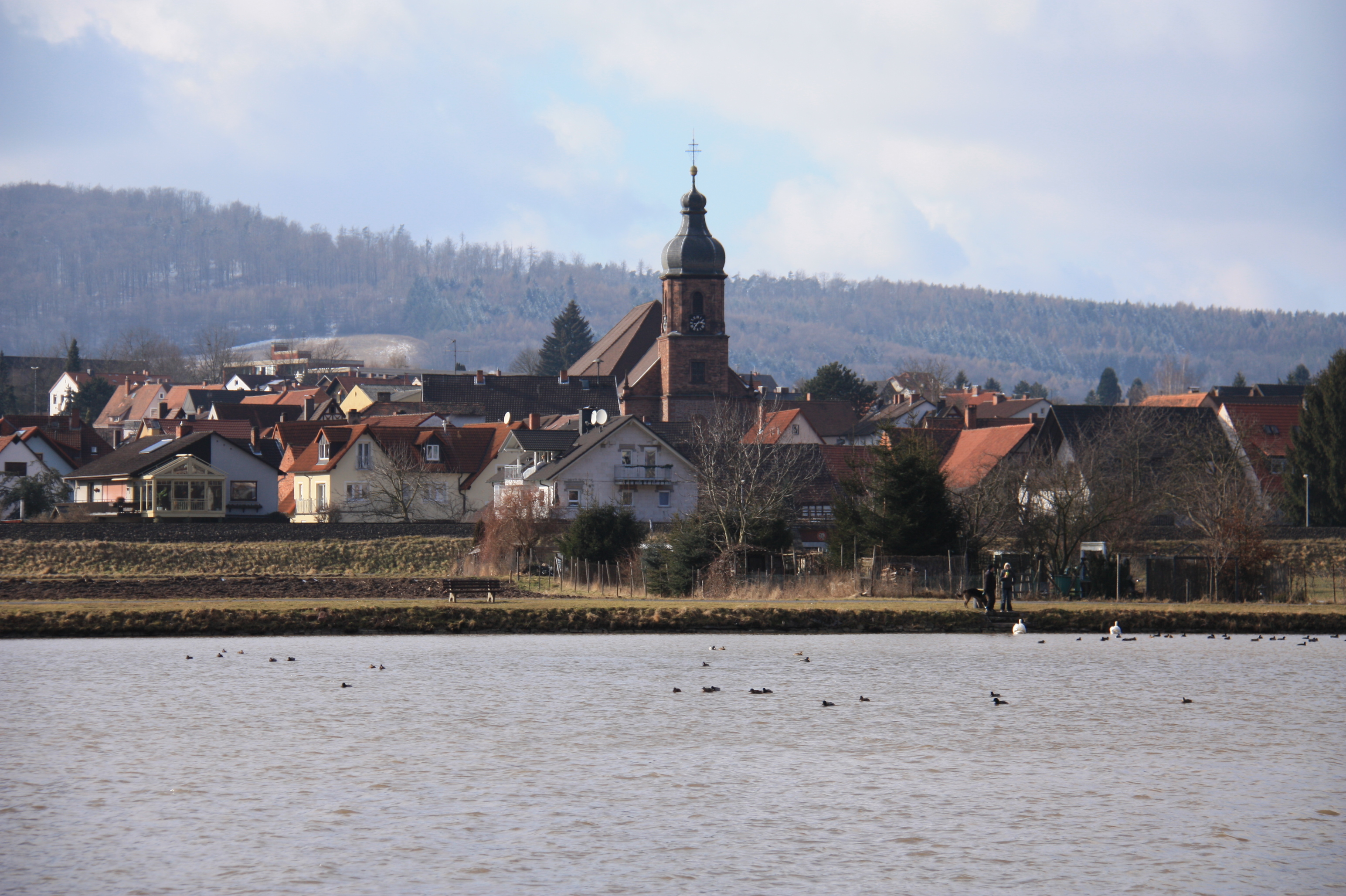 Der Klingenberger Stadtteil Trennfurt im Winter, von der anderen Mainseite aus gesehen